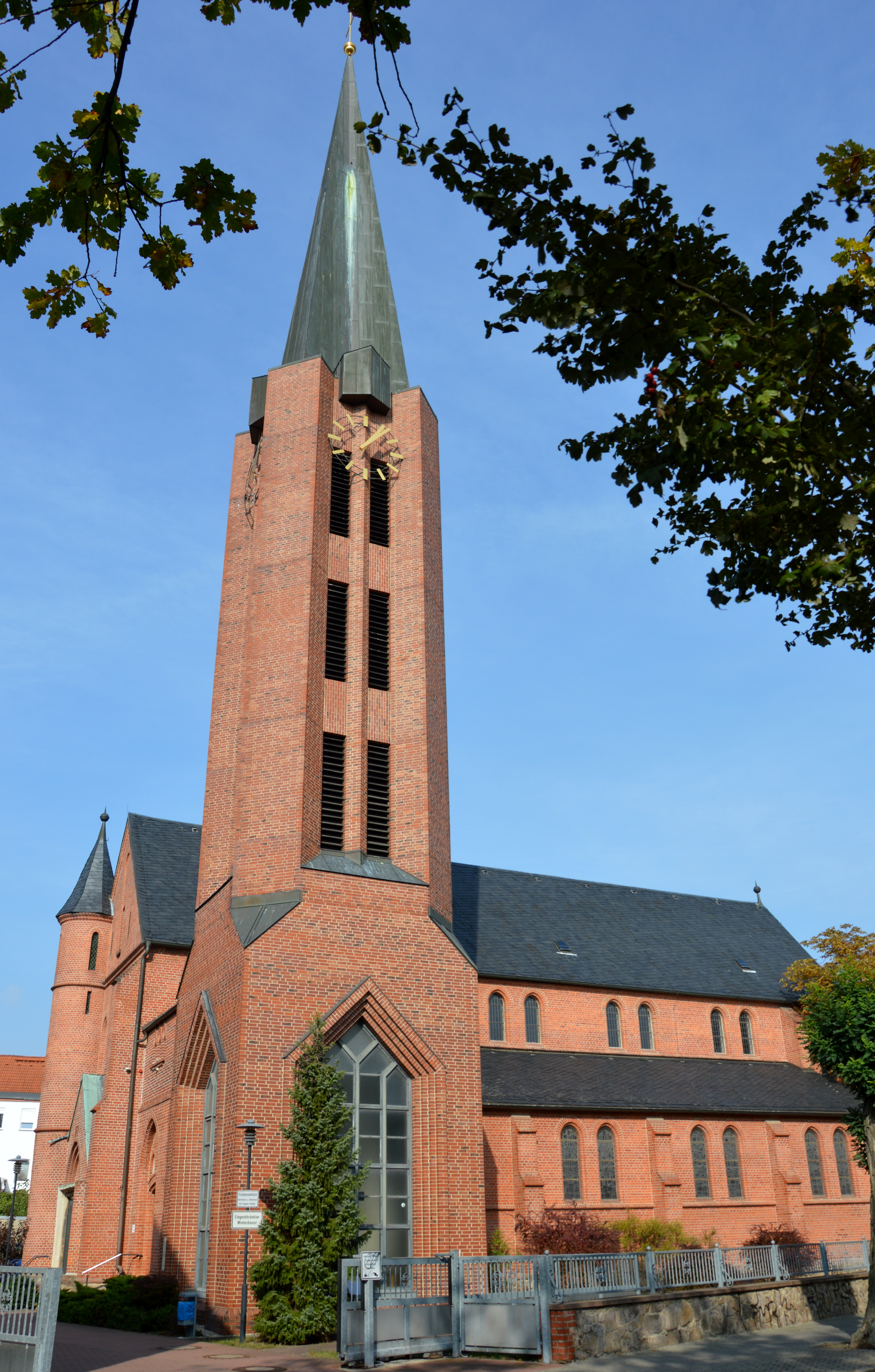 Katholische Kirche Bitterfeld, Röhrenstraße